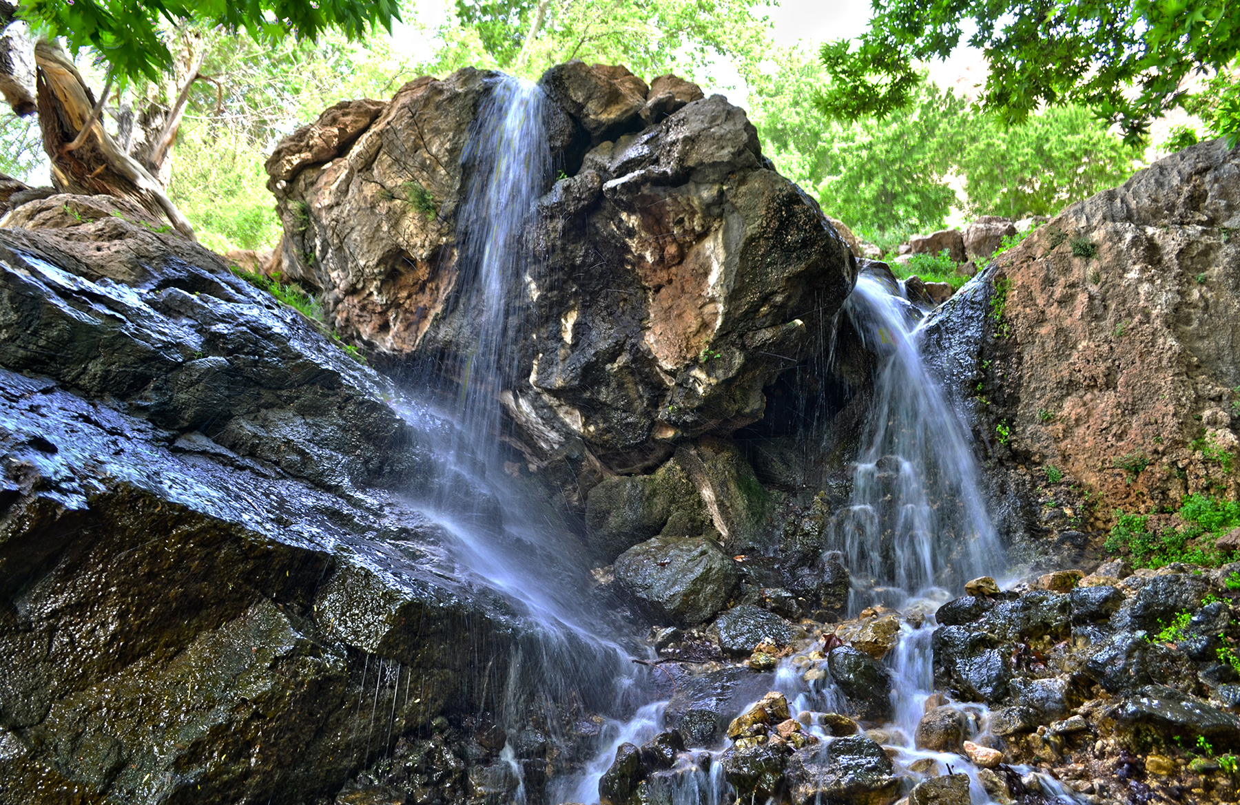 Nature in Neiriz